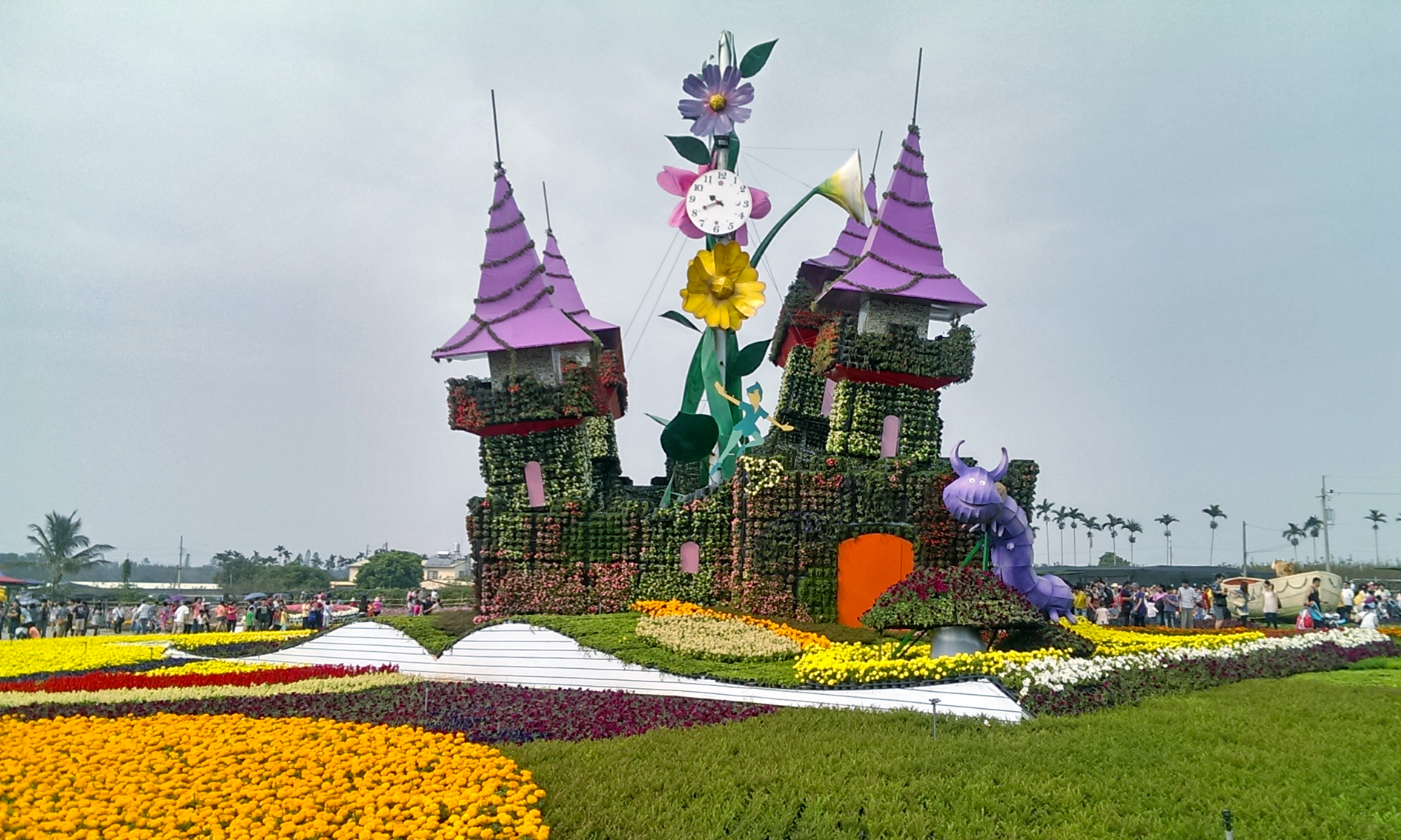 2013年新社花海 愛遊花境主題區